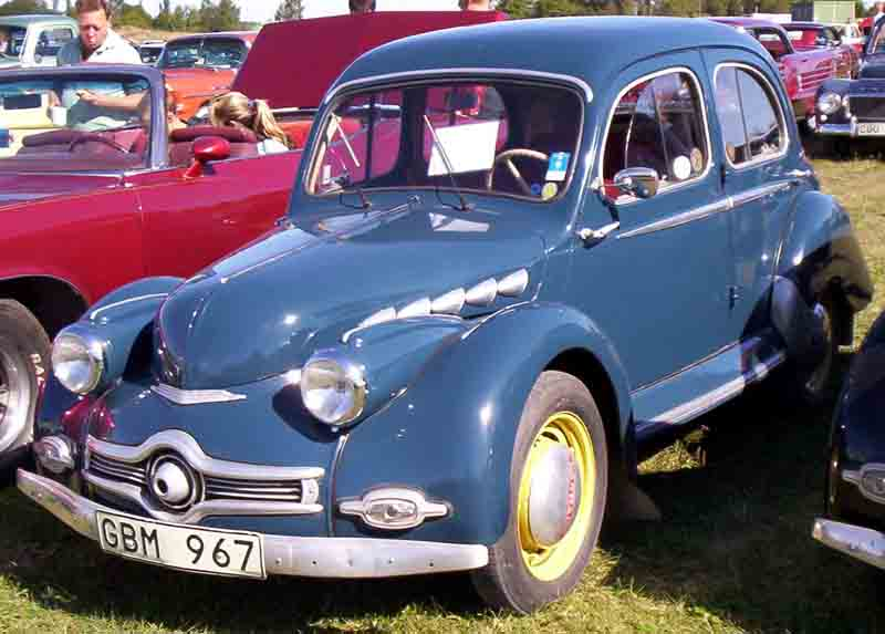 Panhard Dyna X 86 4-Door Sedan 1951